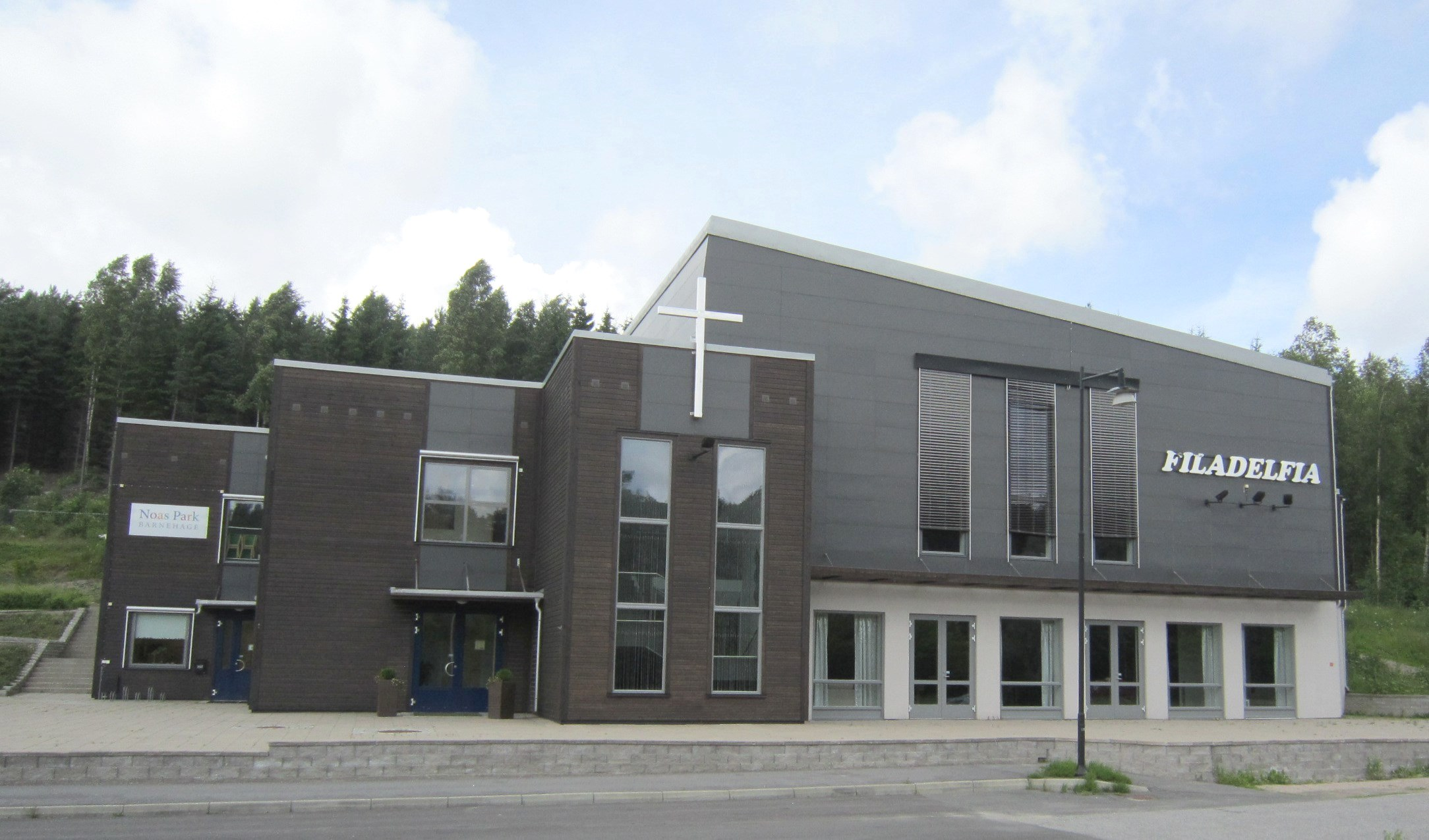 Filadelfia Fredrikstad